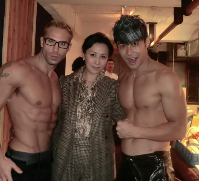 グローバ, カリーナ・ラウ , 陳冠良 (猛男吉祥)